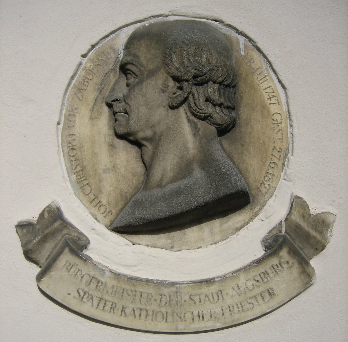 Epitaph zu Johann Christoph von Zabuesnig an der Kirche St. Michael auf dem Hermanfriedhof in Augsburg